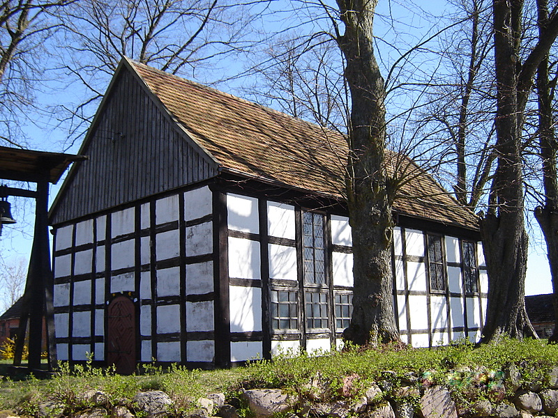 Kościół filialny p.w. św. Szczepana w Starym Dębnie - Gmina Tychowo